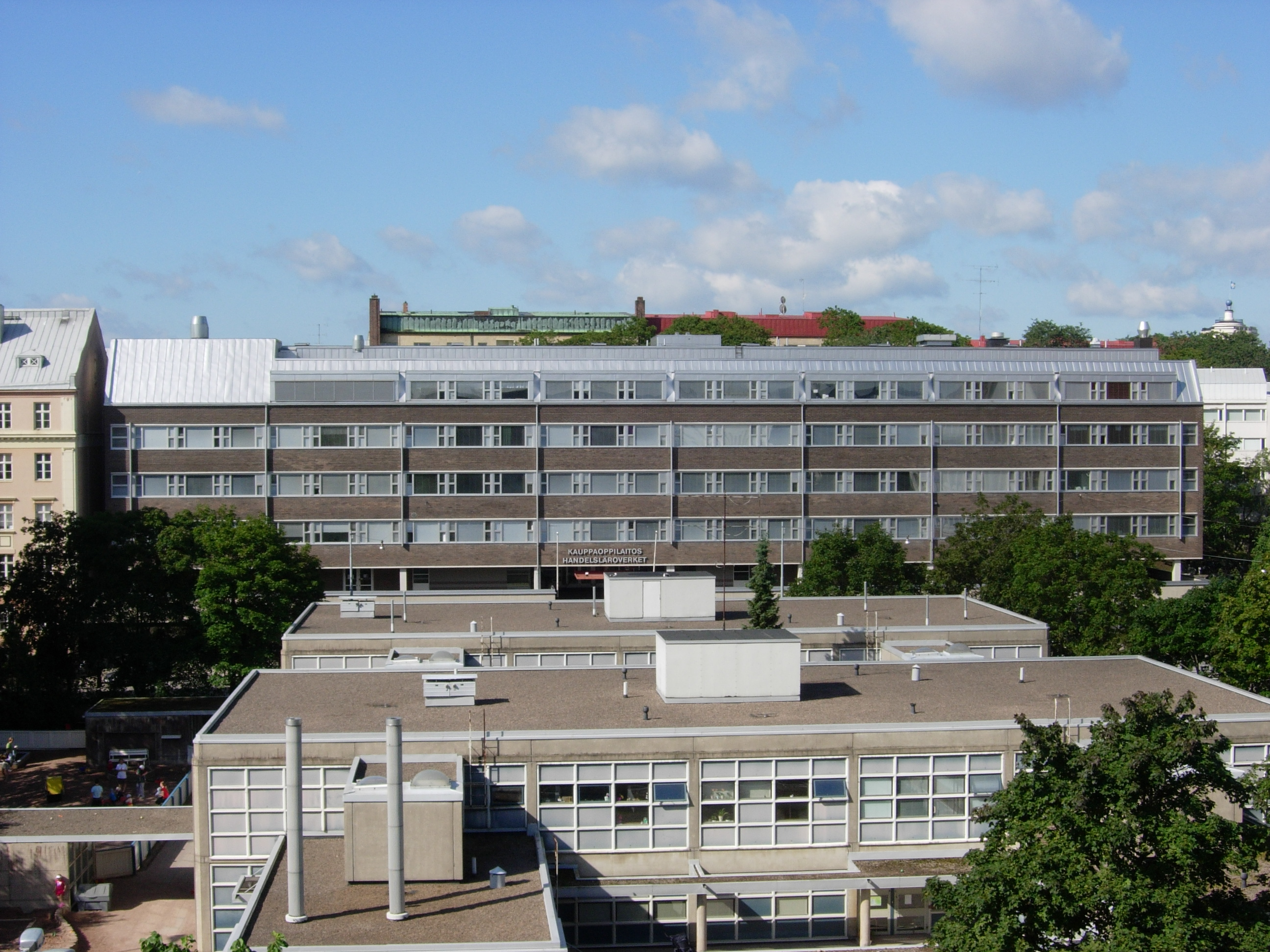 Turun kauppaoppilaitos, nykyään osa Turun ammatti-instituuttia.